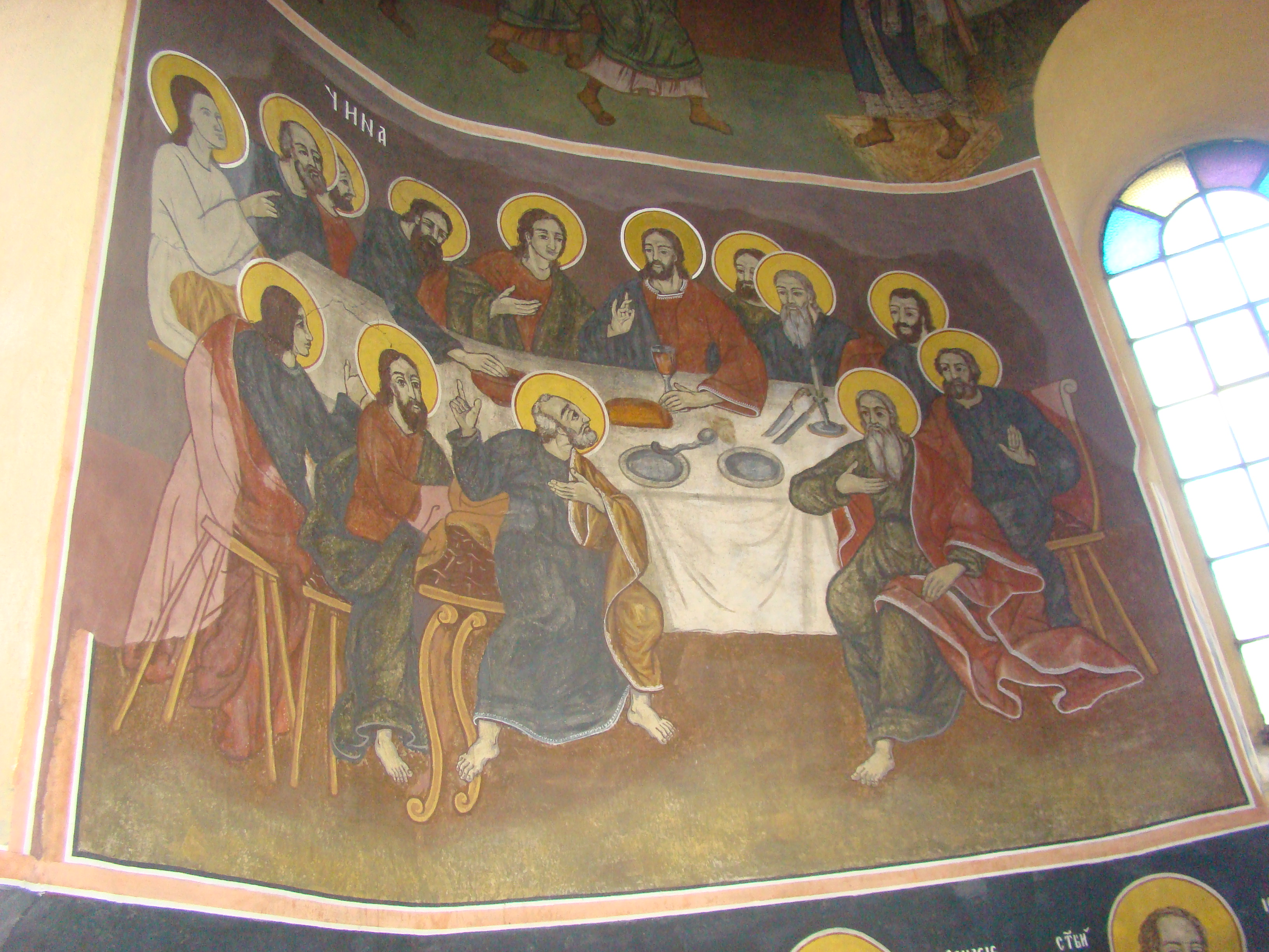 Biserica „Nașterea Născătoarei de Dumnezeu" din Hălmagiu, județul Arad